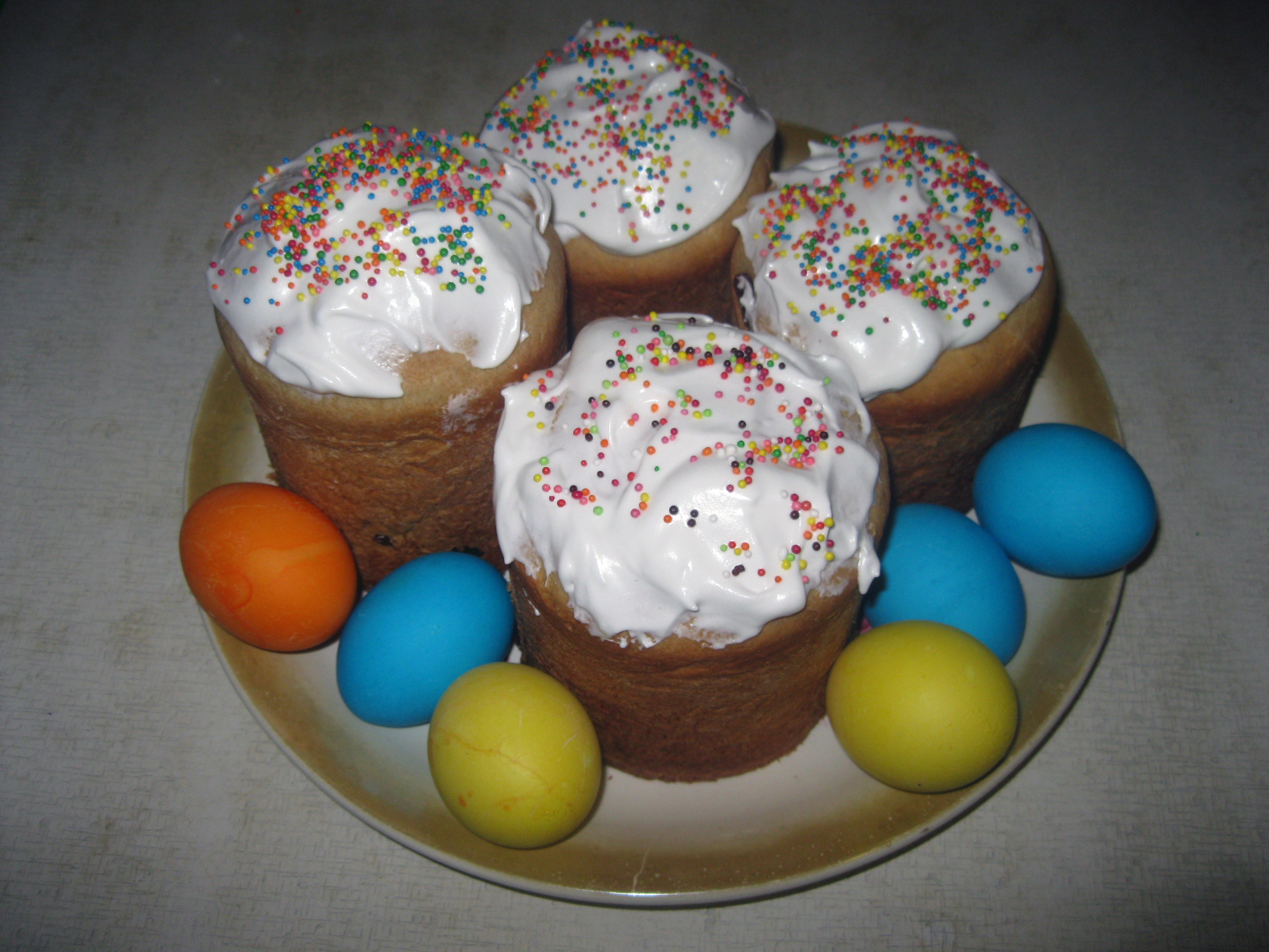 Домашні паски і крашанки у переддень Великодня 2015 року. Кіровоградщина.